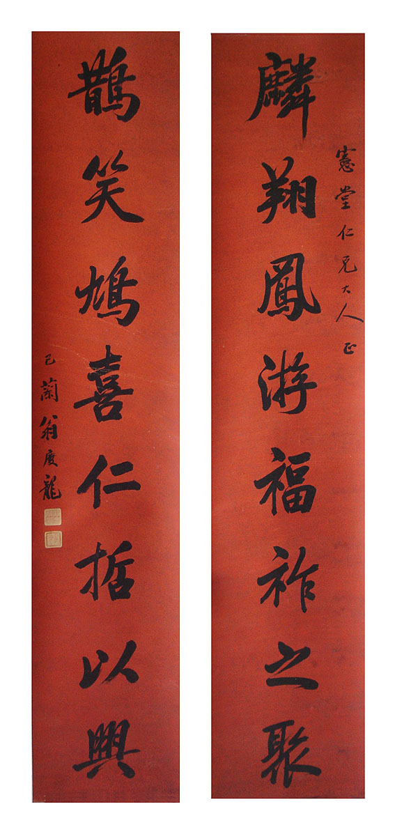 [清] 翁庆龙 书法 墨 来自：清代翁庆龙的书法 原作为二维平面艺术（古代书法作品），作者逝世已逾百年，无特殊版权要求。